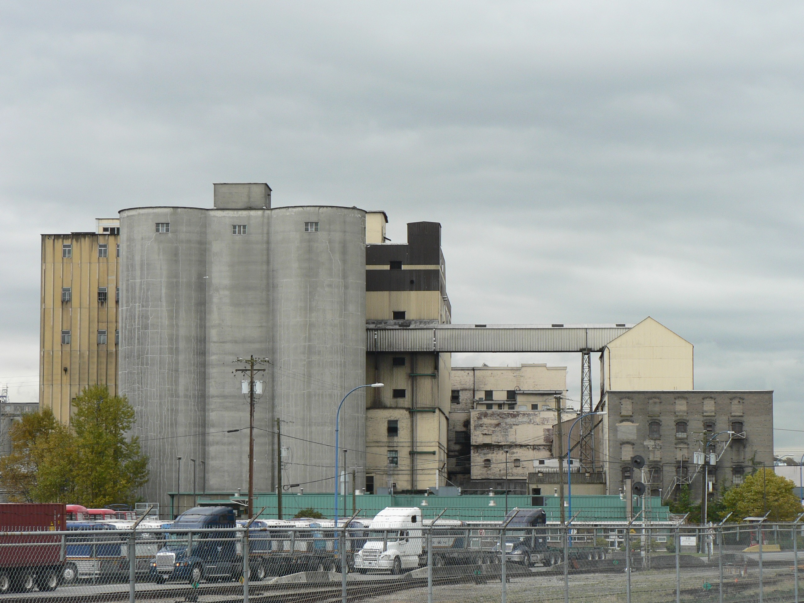 Rogers Sugar Refinery